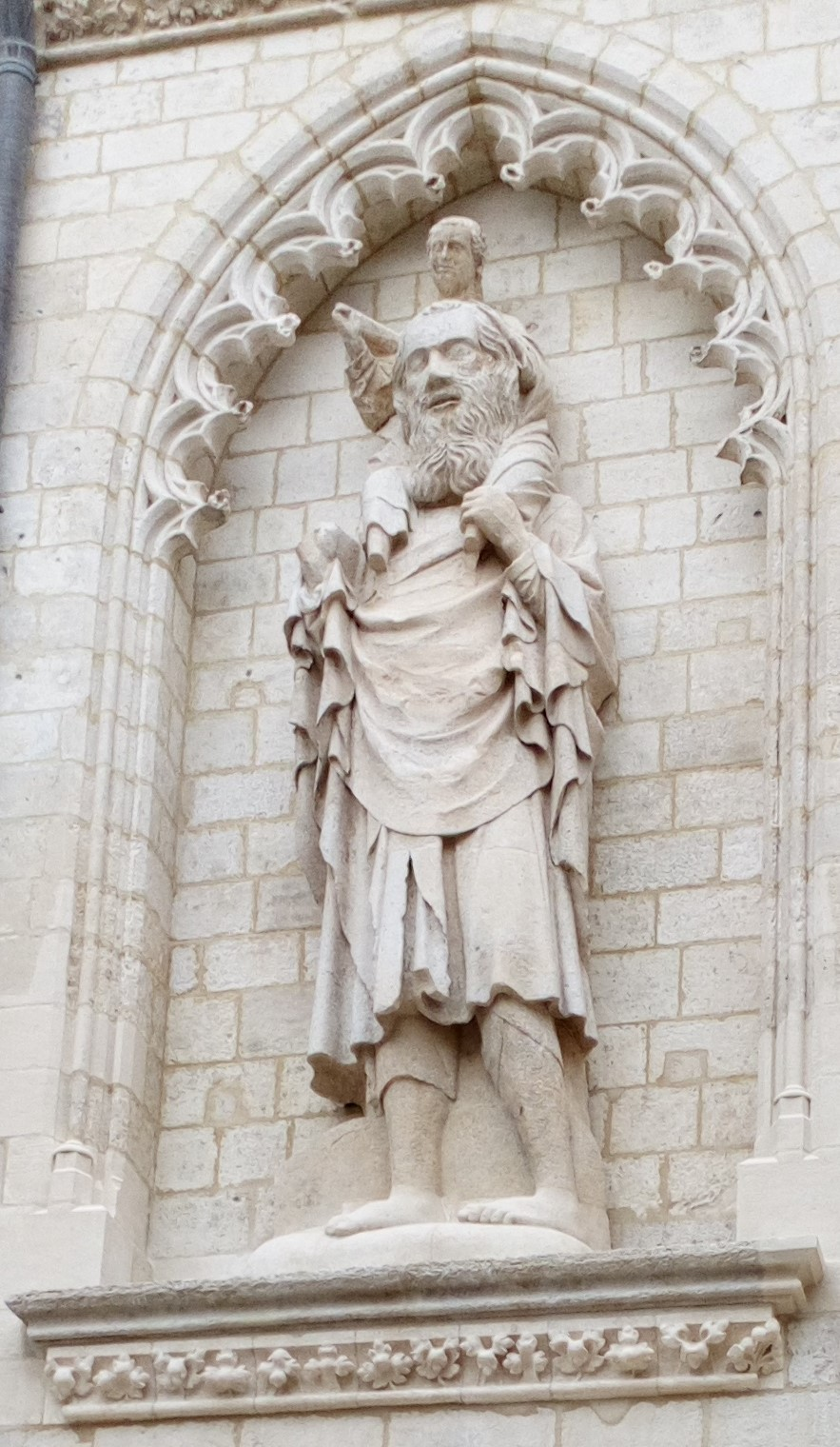 Cathédrale d'Amiens, façade sud 6